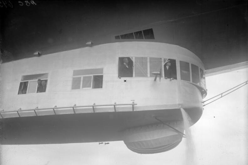 Zu der ersten Probefahrt des für Amerika erbauten Zeppelin-Luftschiffes Z.R. III, welcher am 27.8.1924 in Friedrichshafen am Bodensee stattfand. Die Führergondel des Z.R. III mit dem Erbauer Dr. Hugo Eckener (x) während der Fahrt.